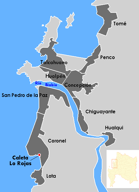 Mapa de Caleta Lo Rojas, Comuna de Coronel, Región del Biobío